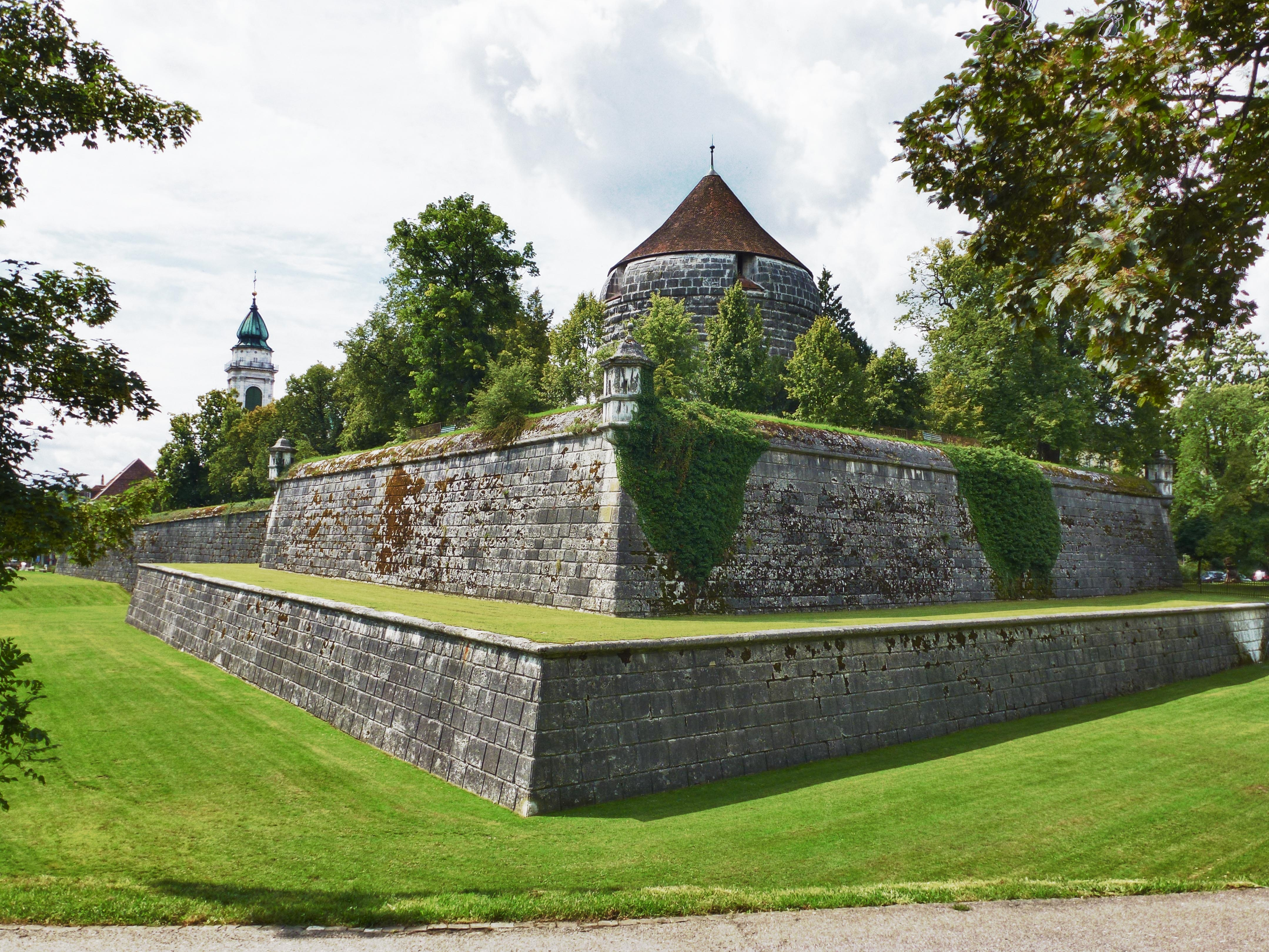 Die Nord/Ostflanke der Schanze in Solothurn